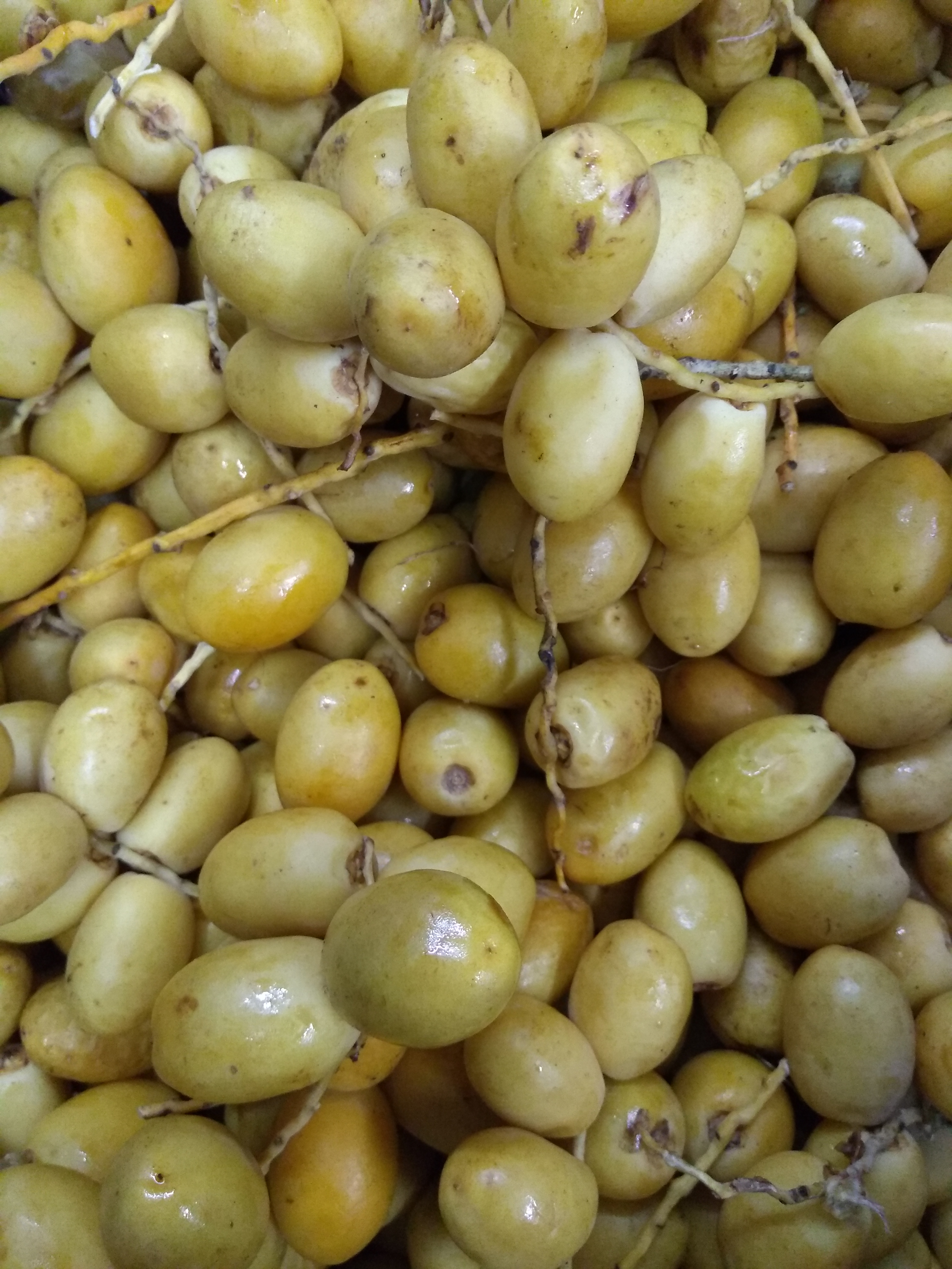 சேலத்தில் விற்பனை செய்யப்படும் பேரீச்சை